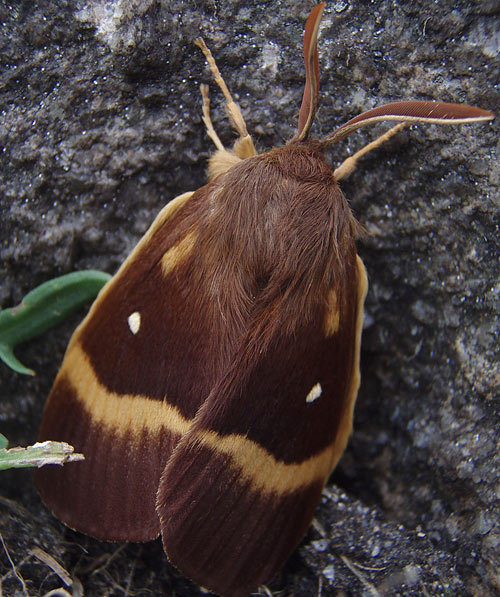 Lasiocampa quercus, male